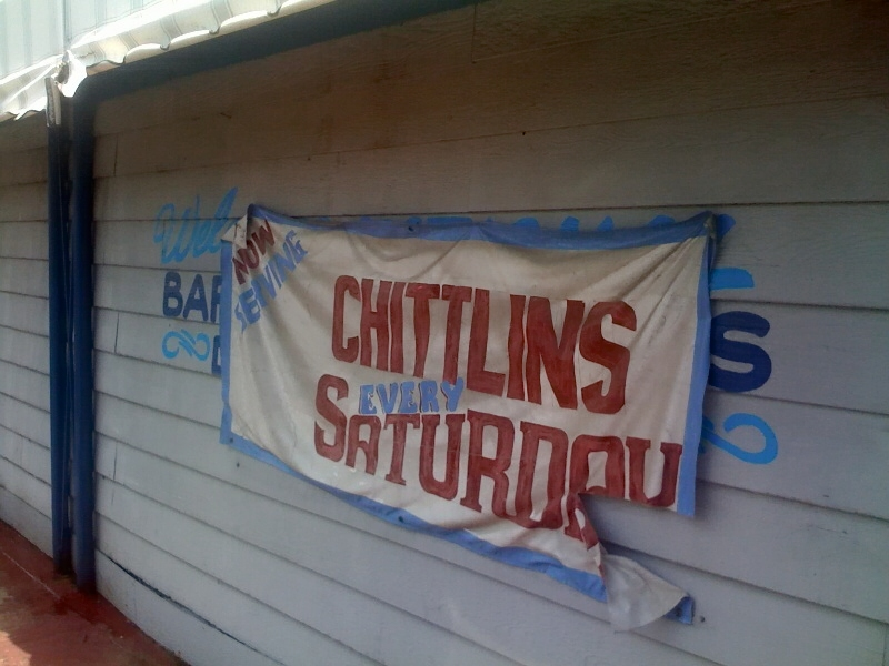 Werbung des Gay Hawk Restaurants in Memphis, Tennessee (USA), für dessen regelmäßigem Angebot ("jeden Samstag") des Soul food-Gerichts Chittlins.